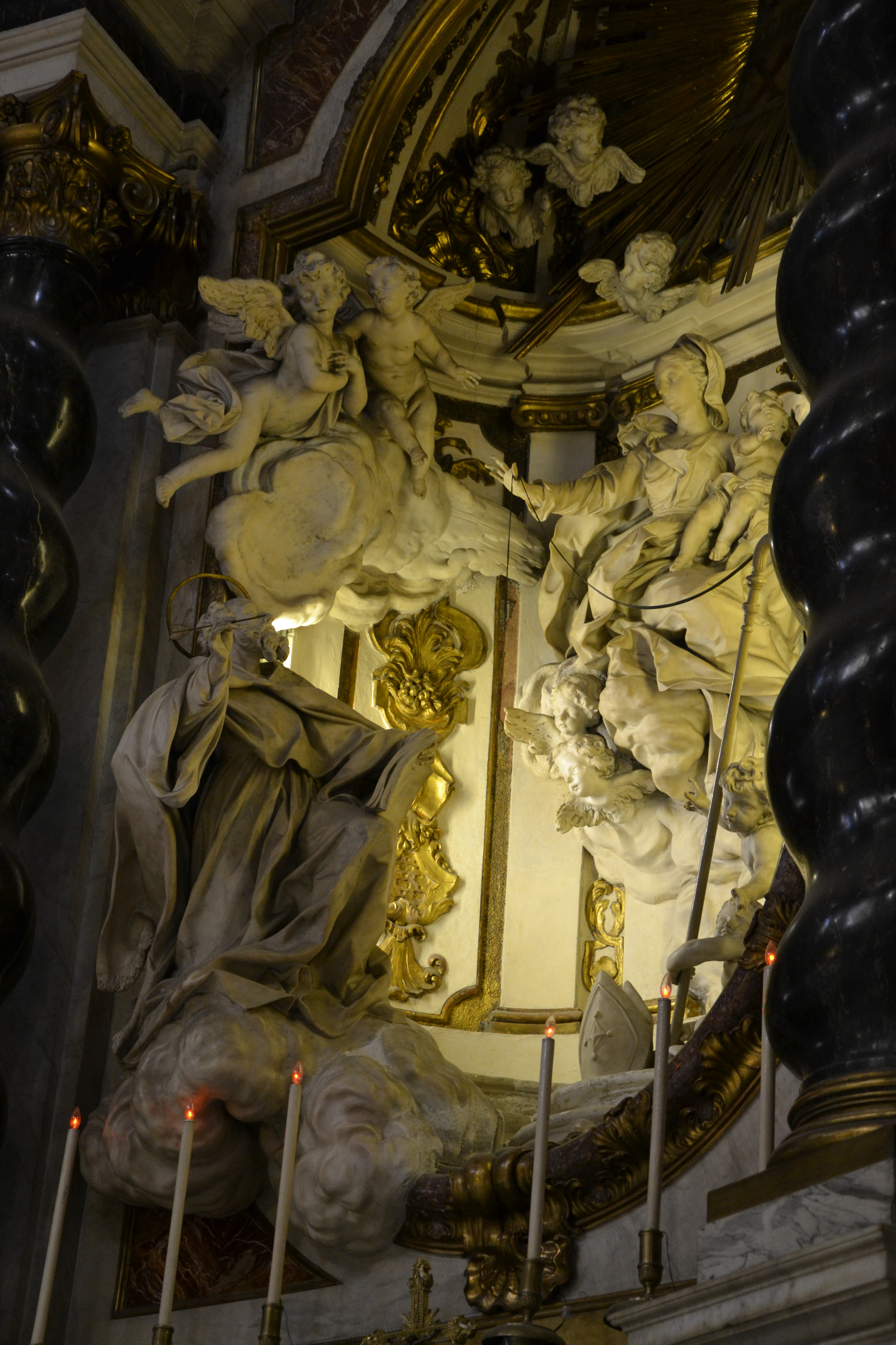 gruppo marmoreo di Bernardo Schiaffino, raffigurante La Madonna con i santi Agostino e Monica, Chiesa della Consolazione (Genova)